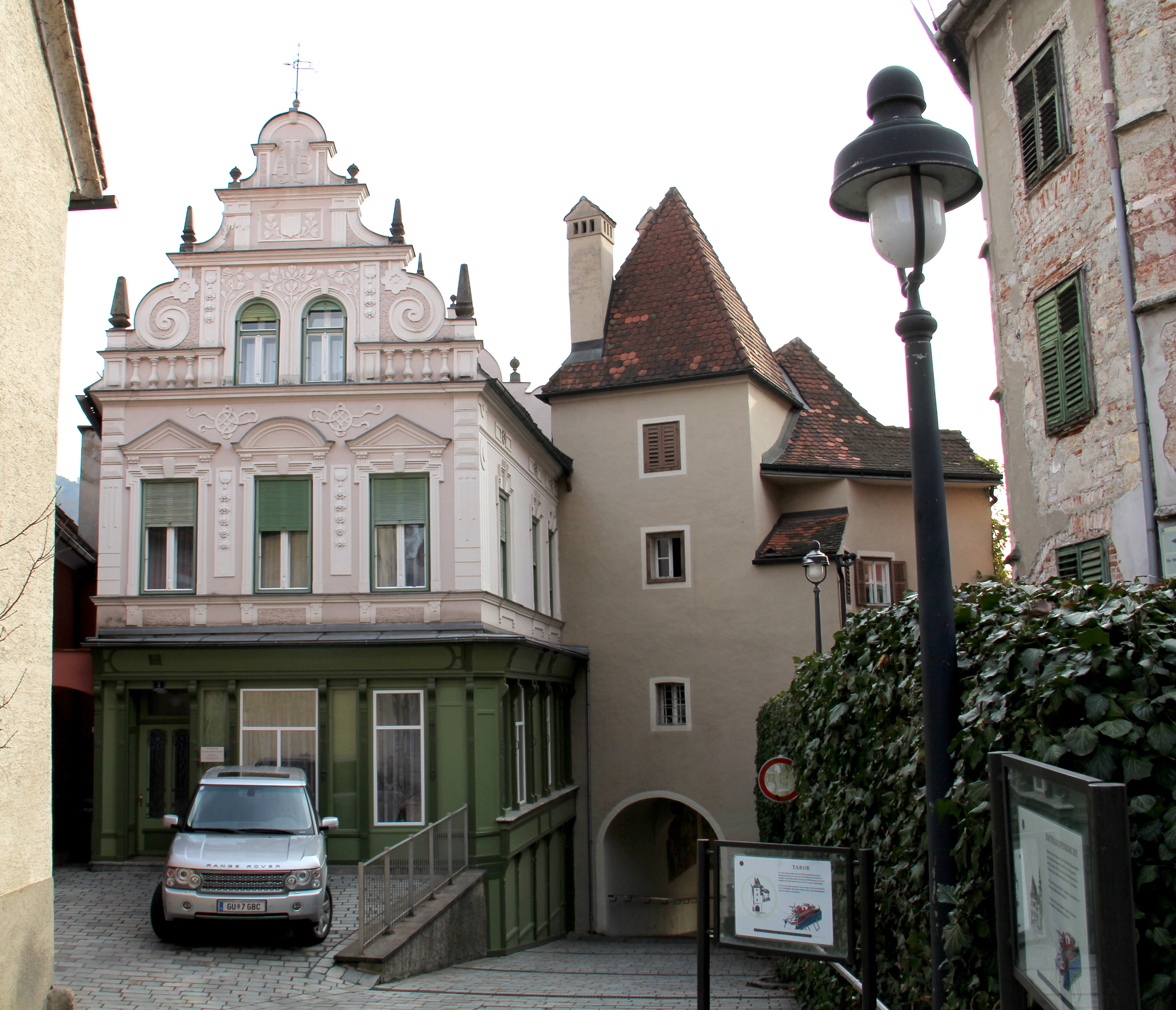 Sog. Payerhof (ehem. Notarhaus)